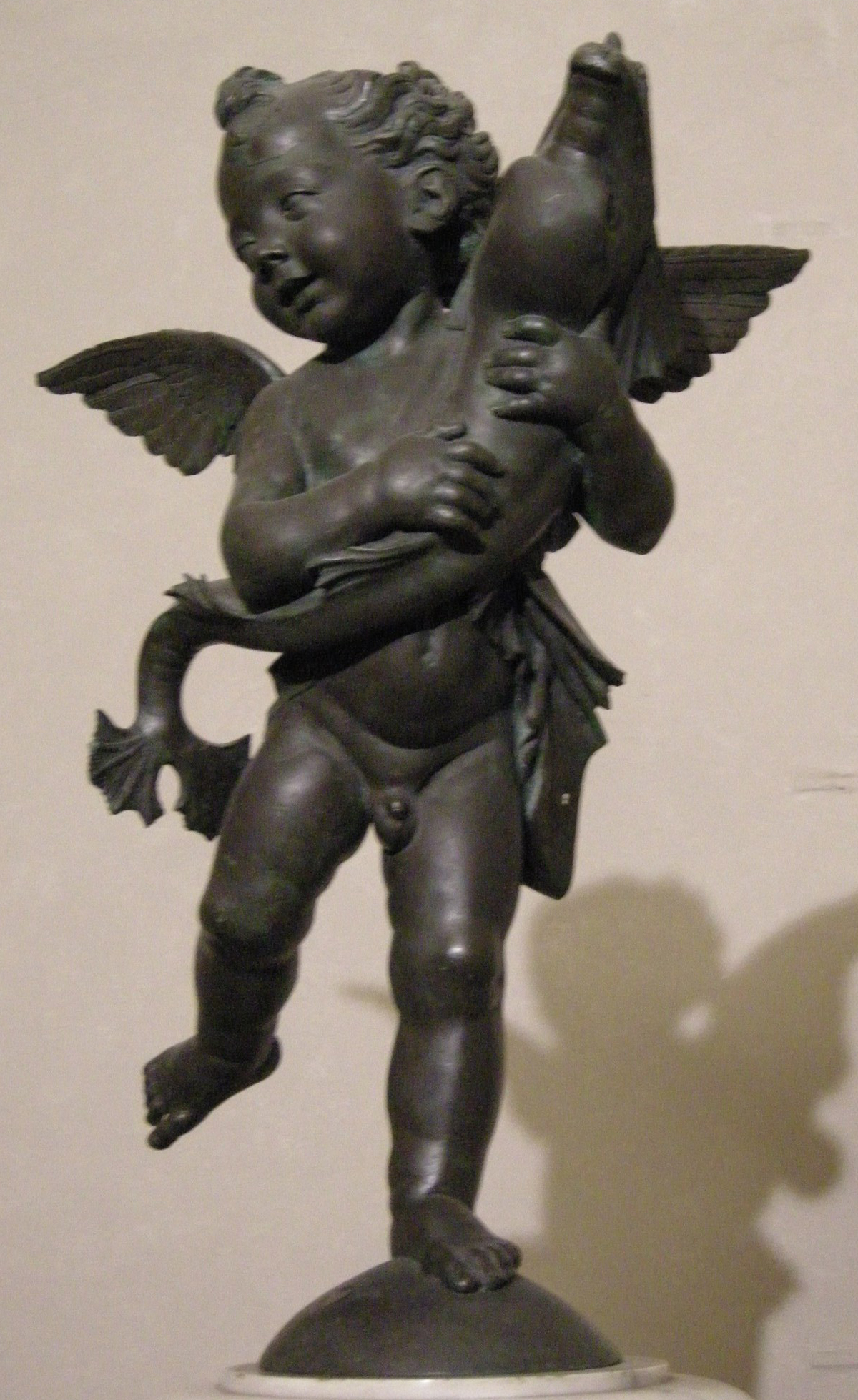 Putto col delfino di verrocchio